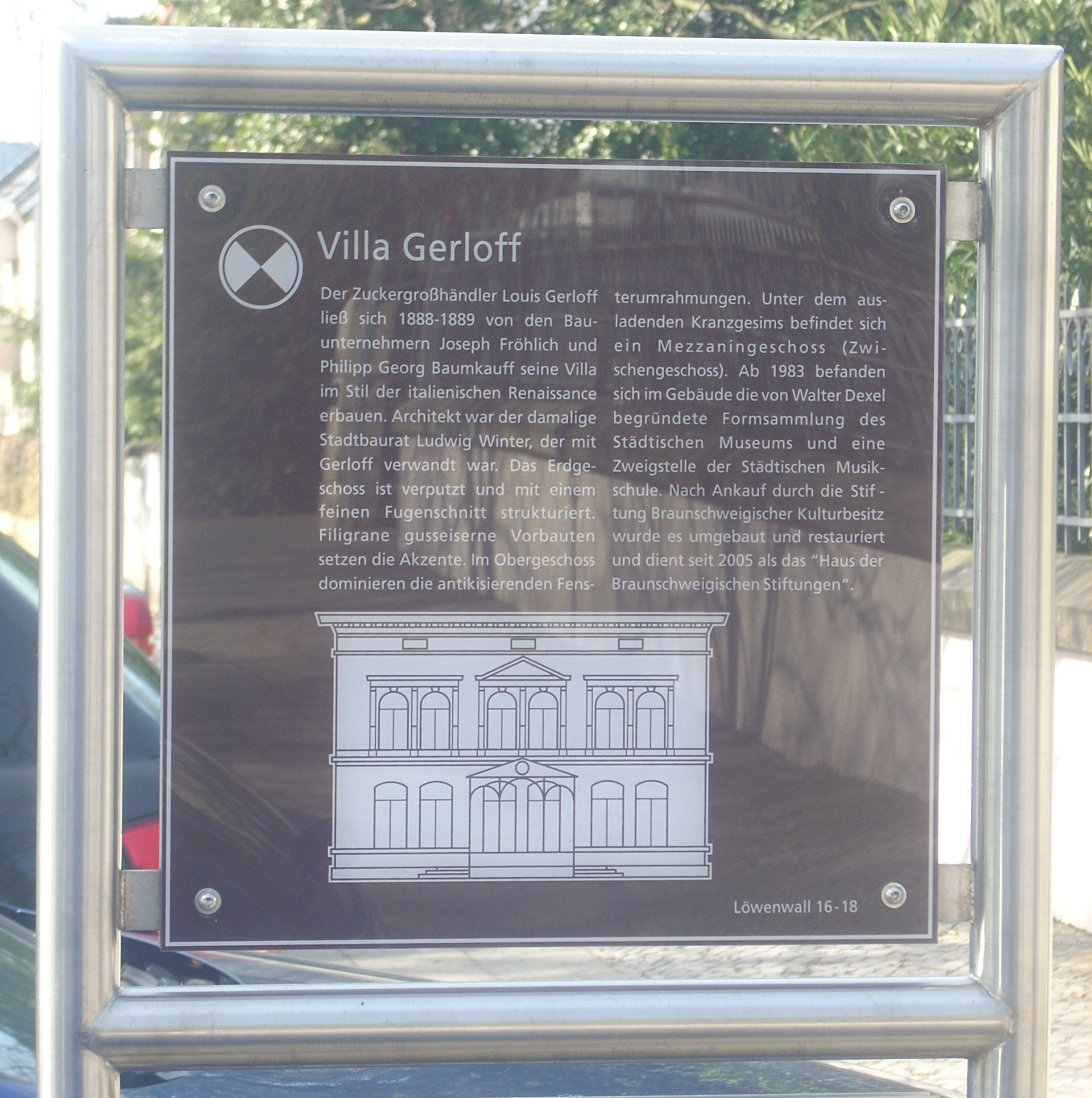 Braunschweig, Villa Gerloff, Infotafel am Löwenwall